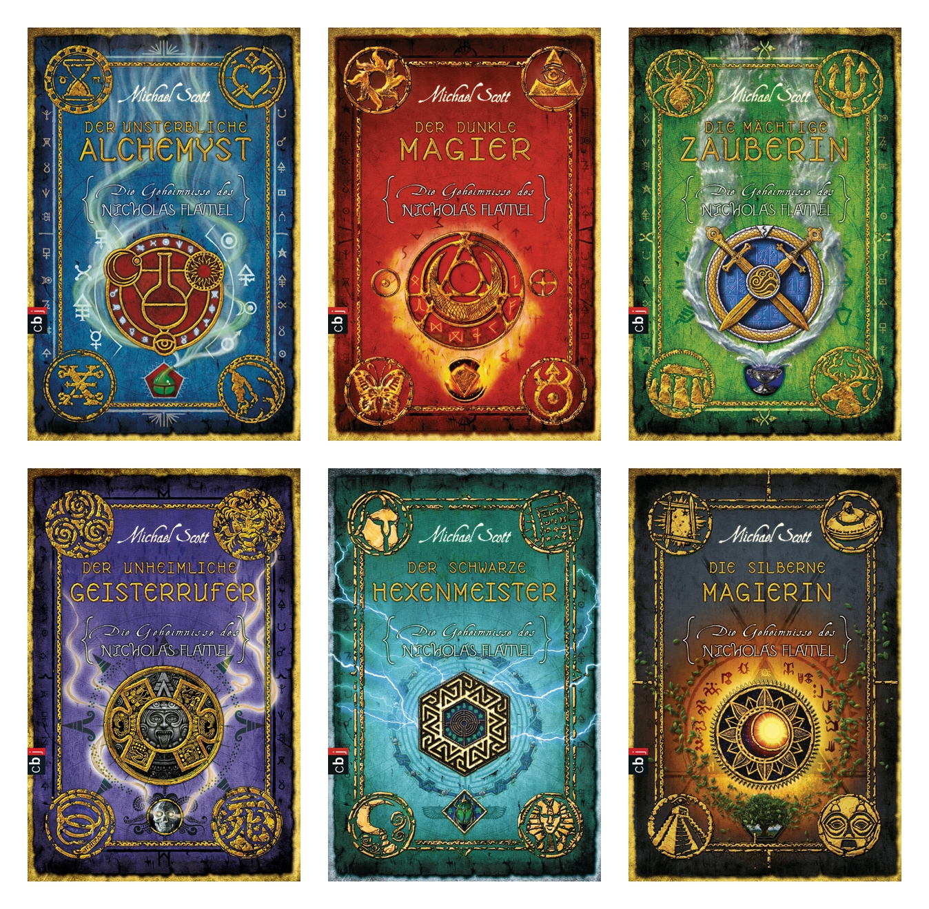 Michael Scott: Die Geheimnisse des Nicholas Flamel. 1. Der unsterbliche Alchemyst 2. Der dunkle Magier 3. Die mächtige Zauberin 4. Der unheimliche Geisterrufer 5. Der schwarze Hexenmeister 6. Die silberne Magierin cbj, München.